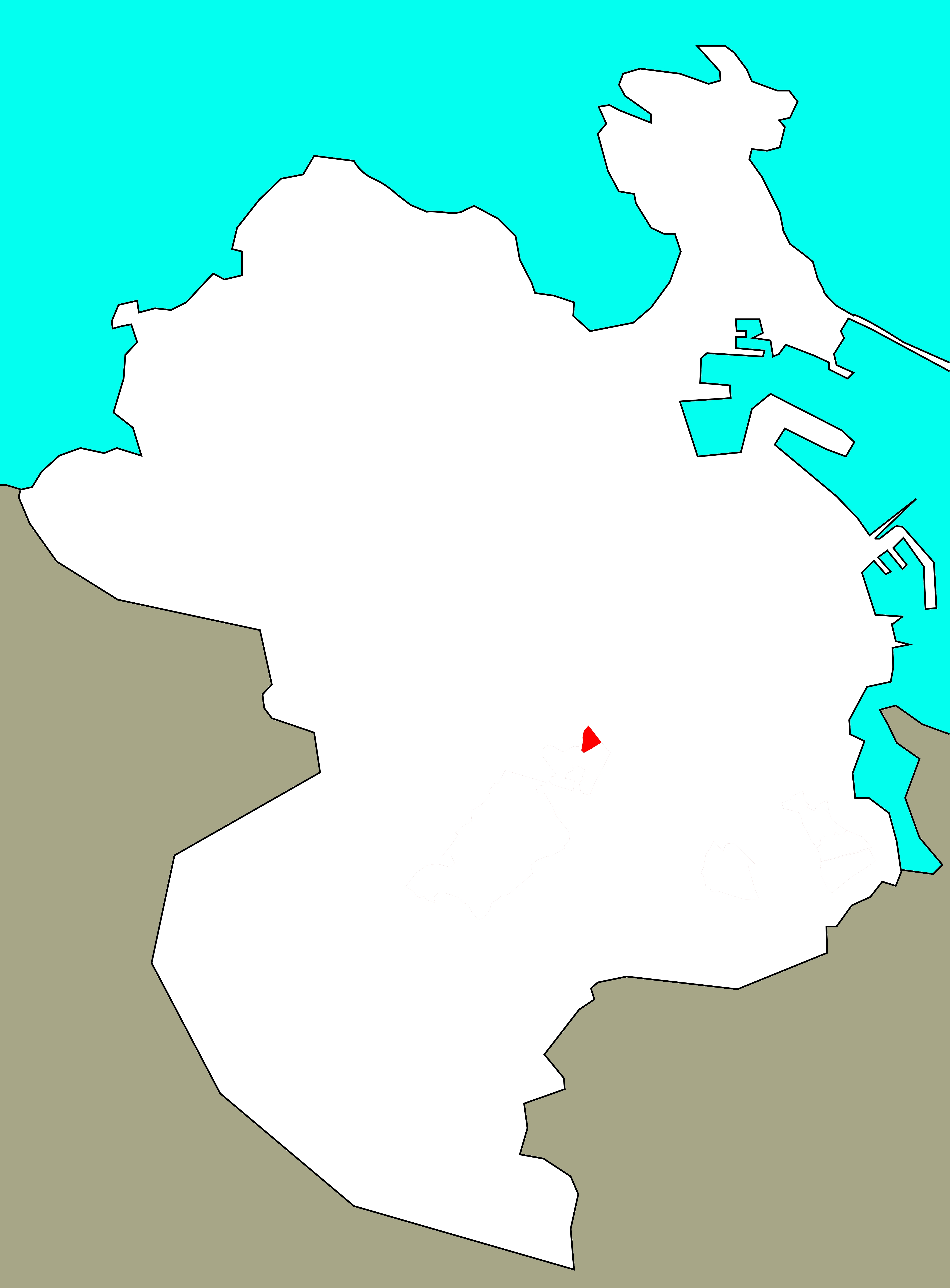 Situación da Cabana no concello da Coruña.[1]